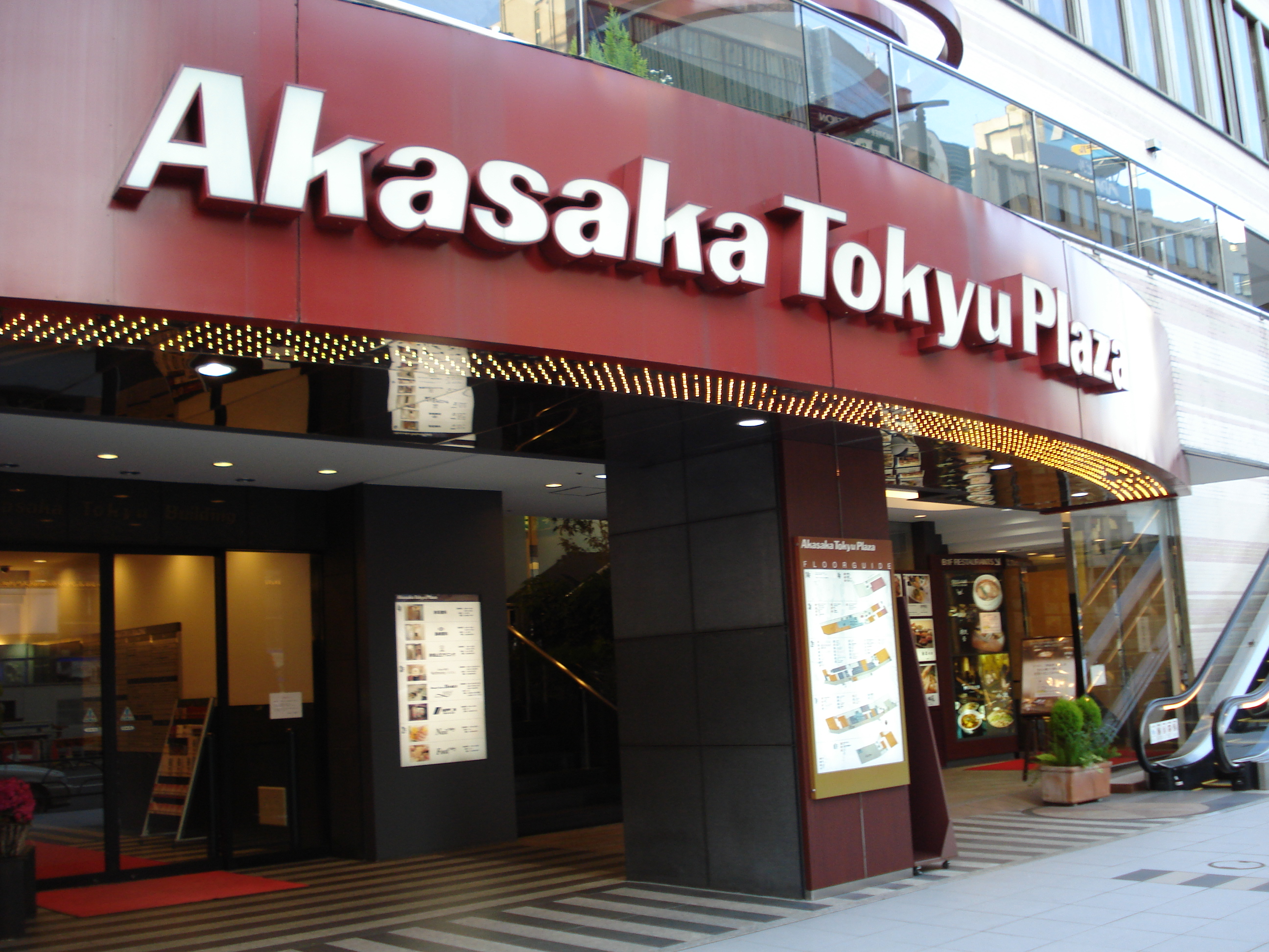 AKASAKA TOKYU PLAZA